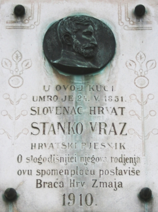 Spomen ploča Stanku Vrazu u Opatičkoj ulici 18, Zagreb